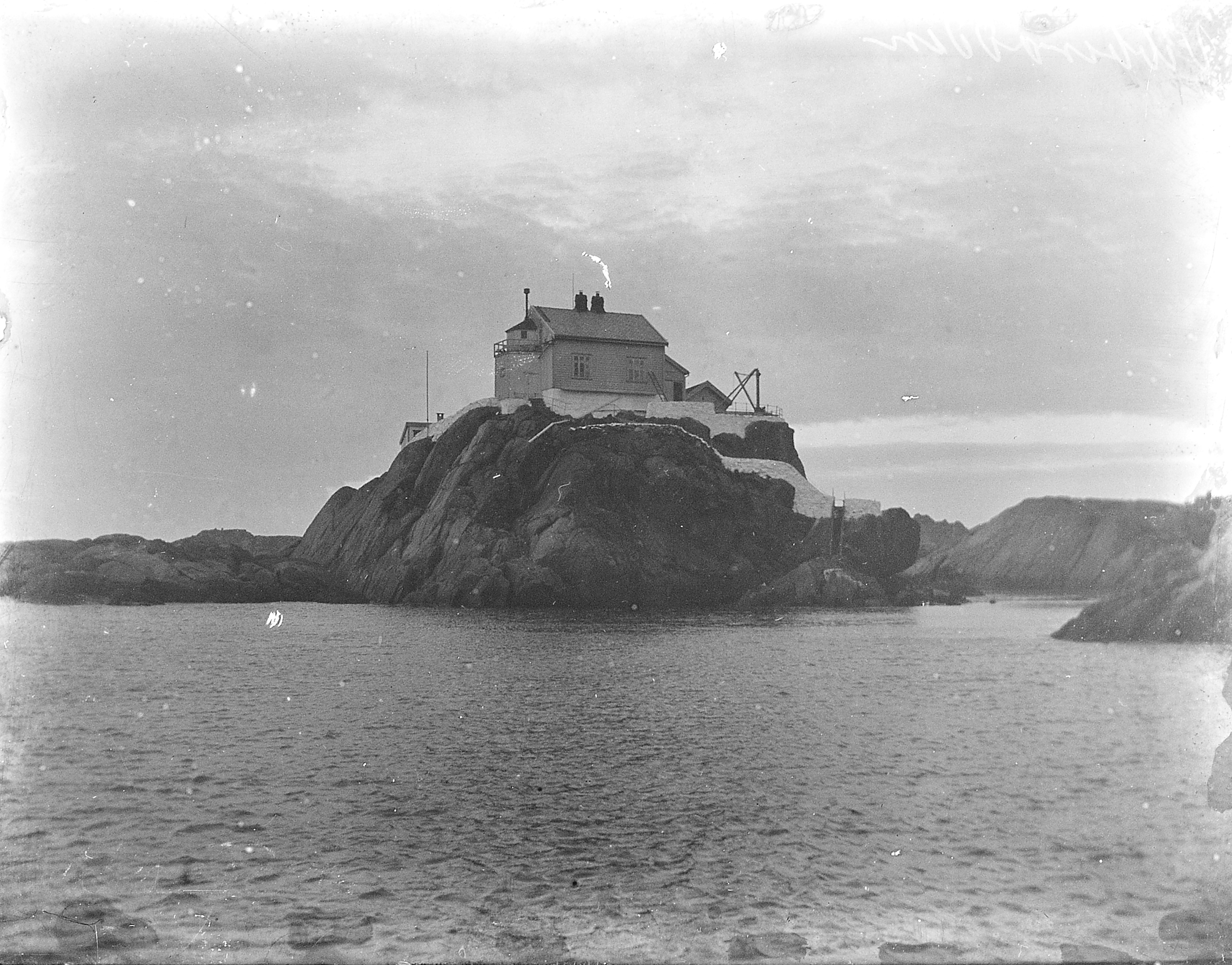 Bildet er hentet fra Arkivverket. Vibberodden, Eigersund Arkivinstitusjon : Riksarkivet Arkivnavn : Fyrdirektoratet Sted : Norge, Rogaland, Eigersund, Emneord: Fyr, Kyst Avbildet